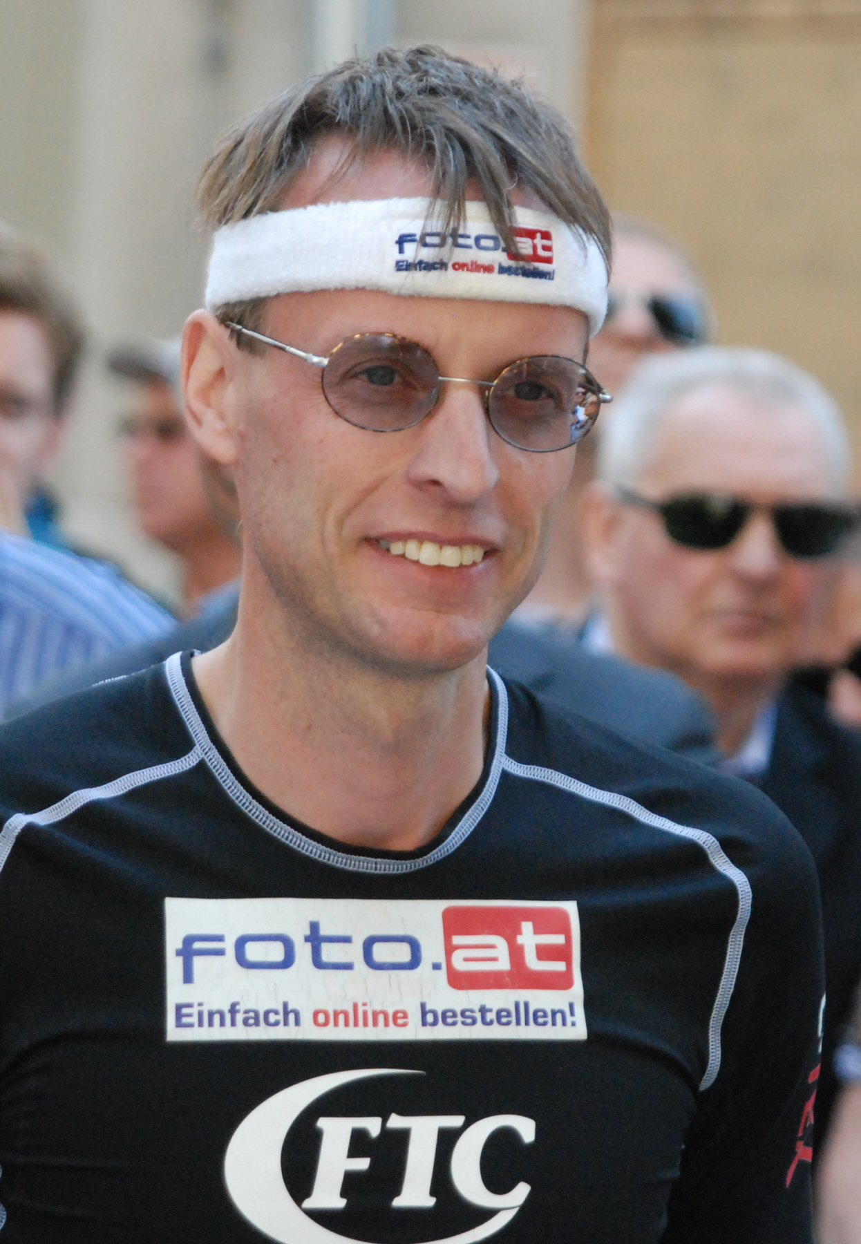 Rolf Majcen beim 1. Steffl-Turmlauf in Wien